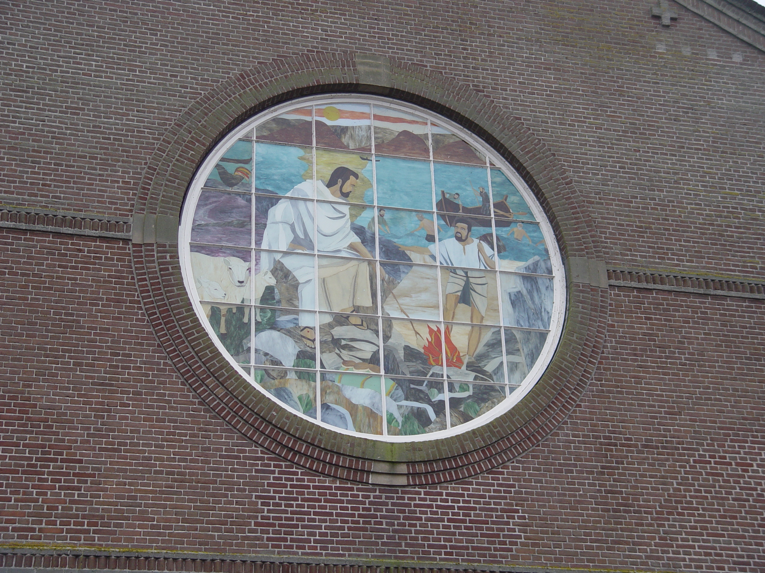 Urk - Bethelkerk - venster boven de ingang